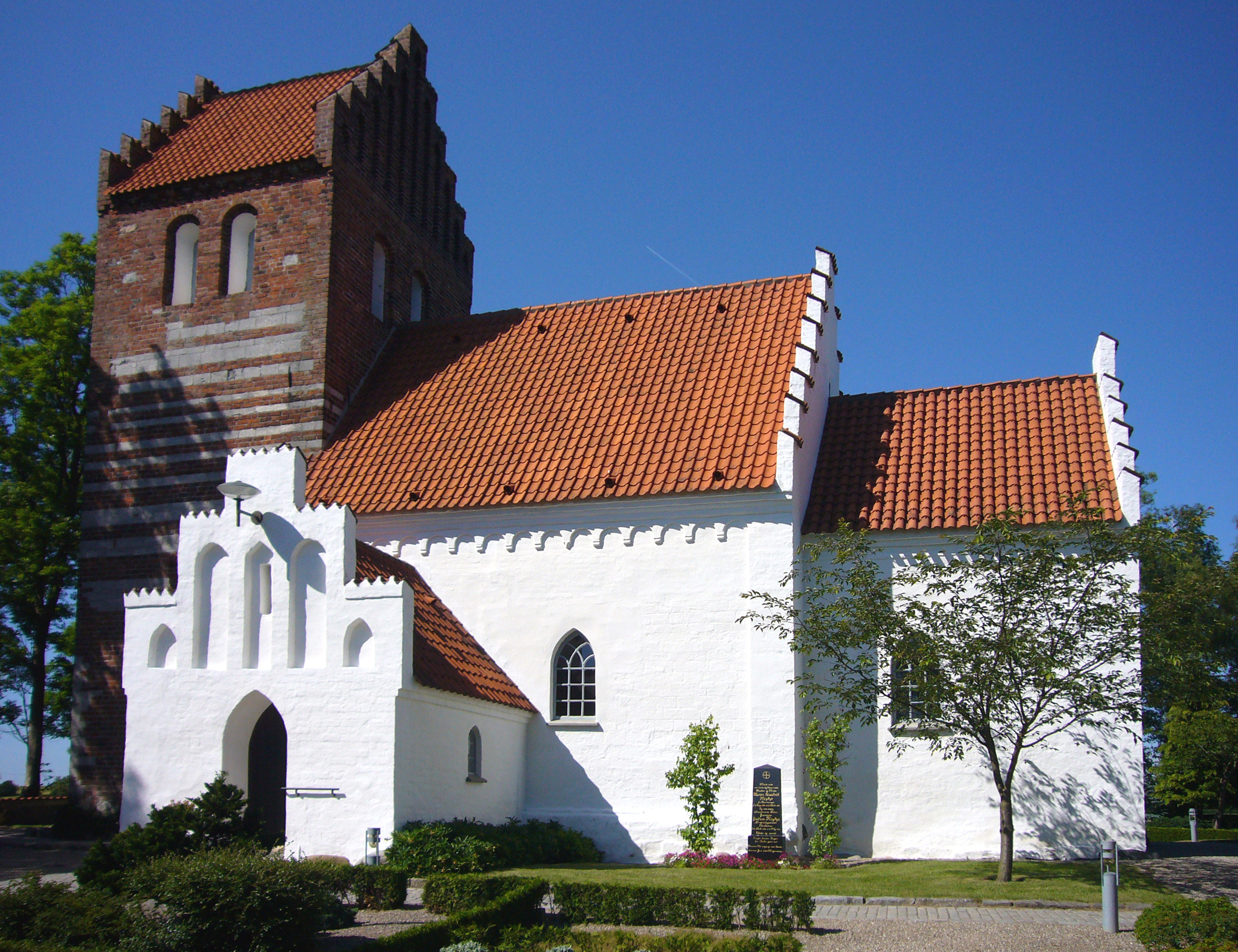 Karlstrup Kirke, Roskilde County, Denmark.